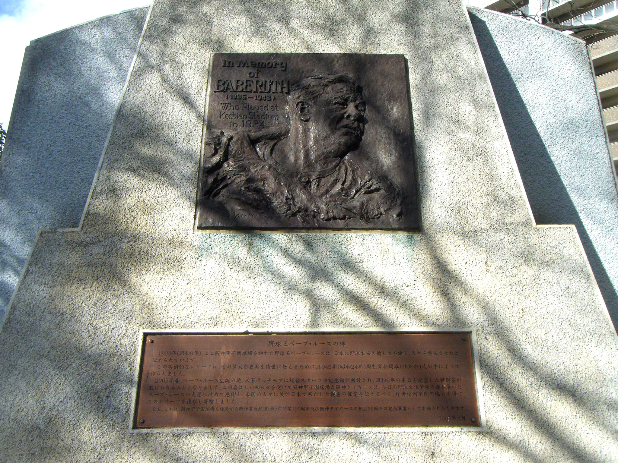 阪神甲子園球場 ミズノスクエア 野球王ベーブ・ルースの碑